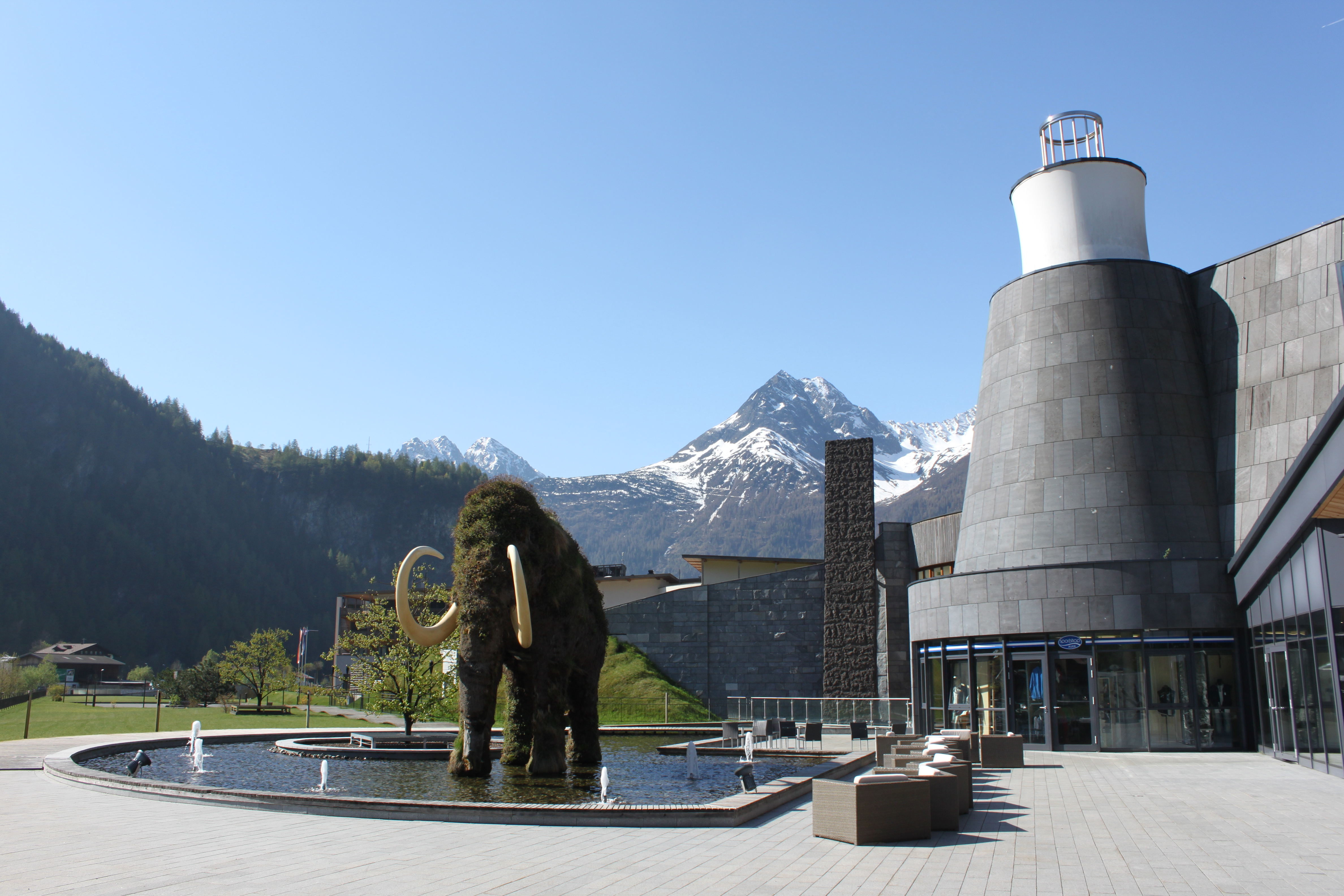 Mammutbrunnen vor dem Aqua Dome Längenfeld